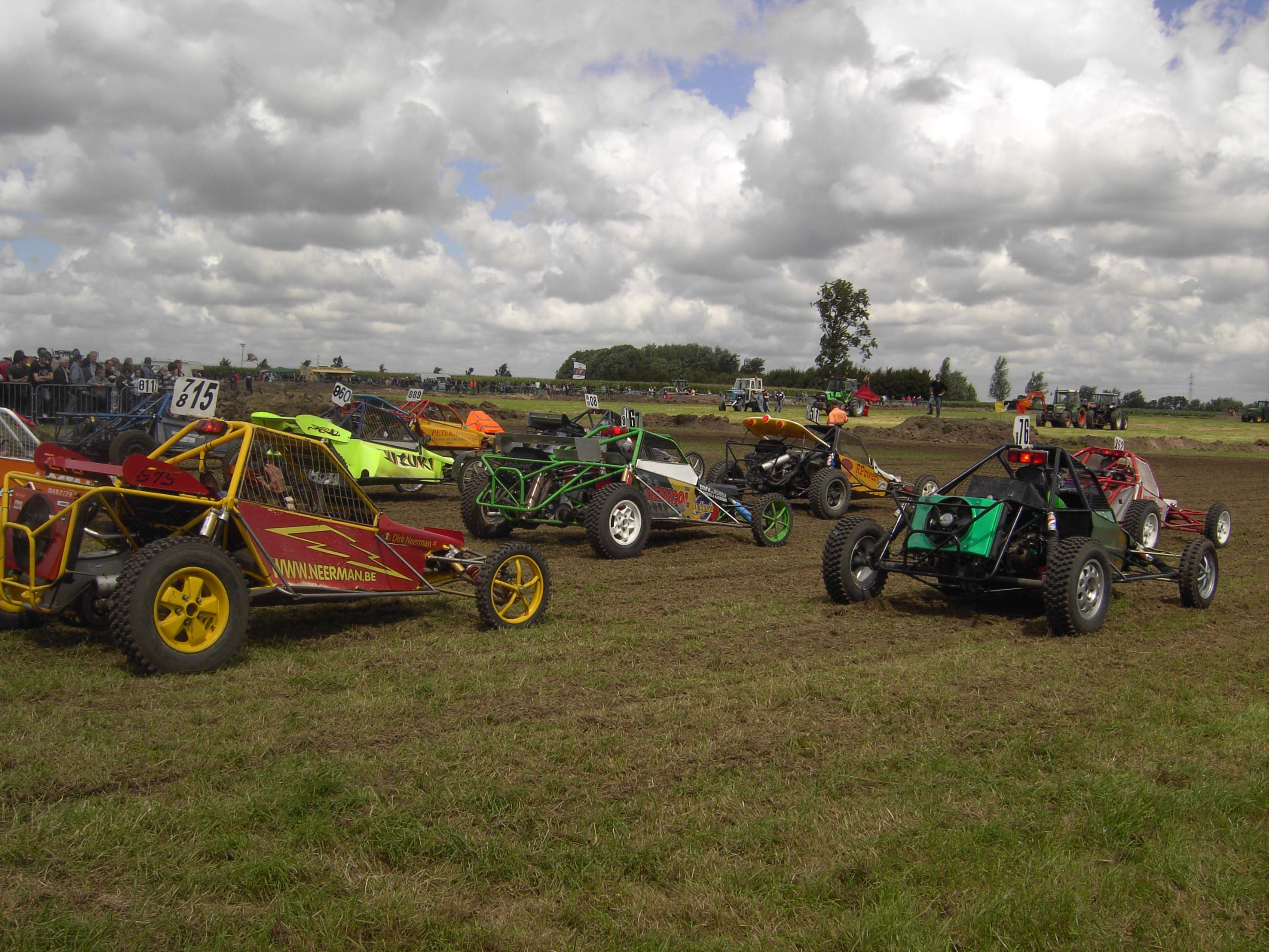 VACB - Vrije Autocrossbond - Belgium